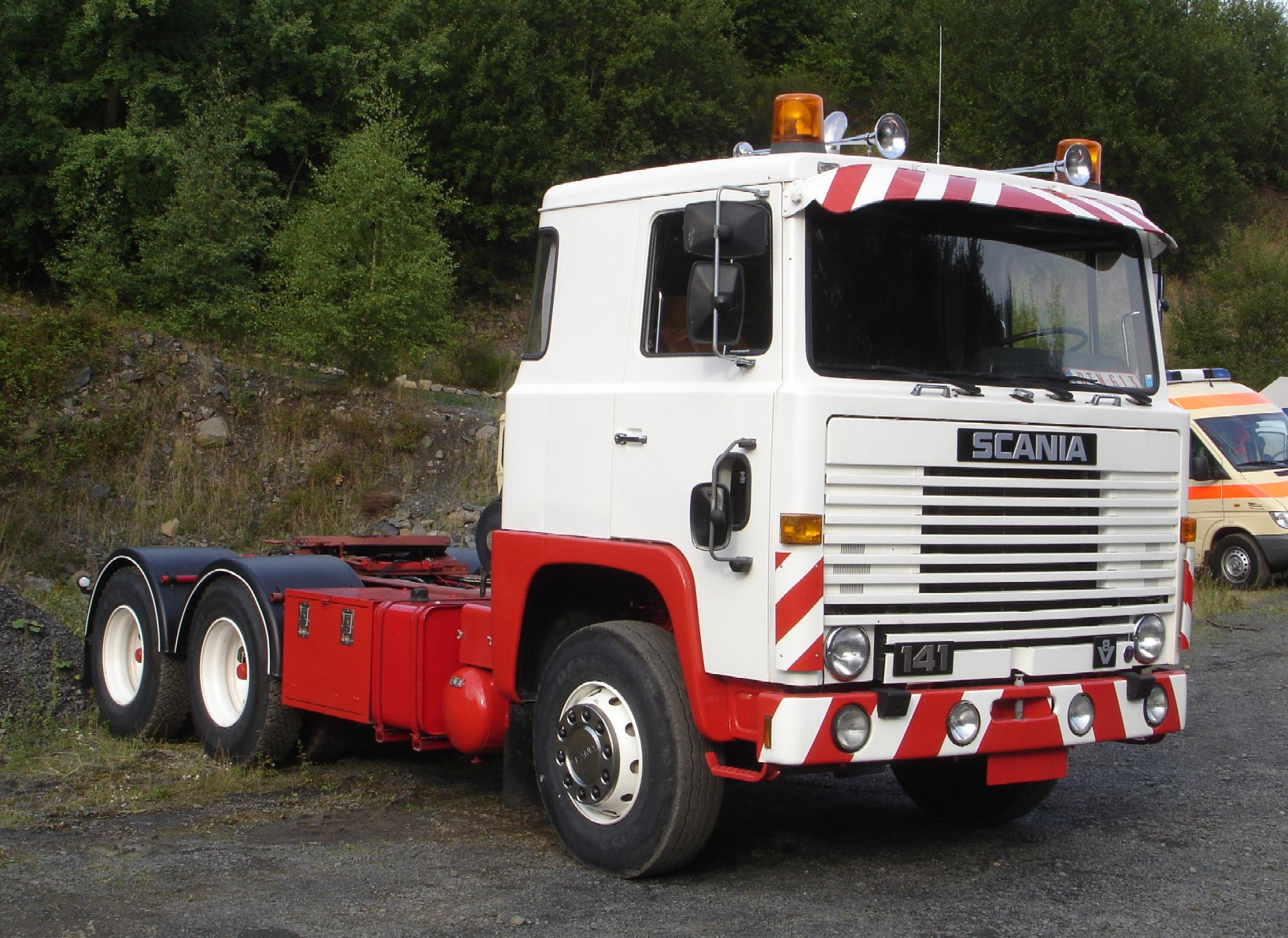 Scania LBS141 Sattelschlepper